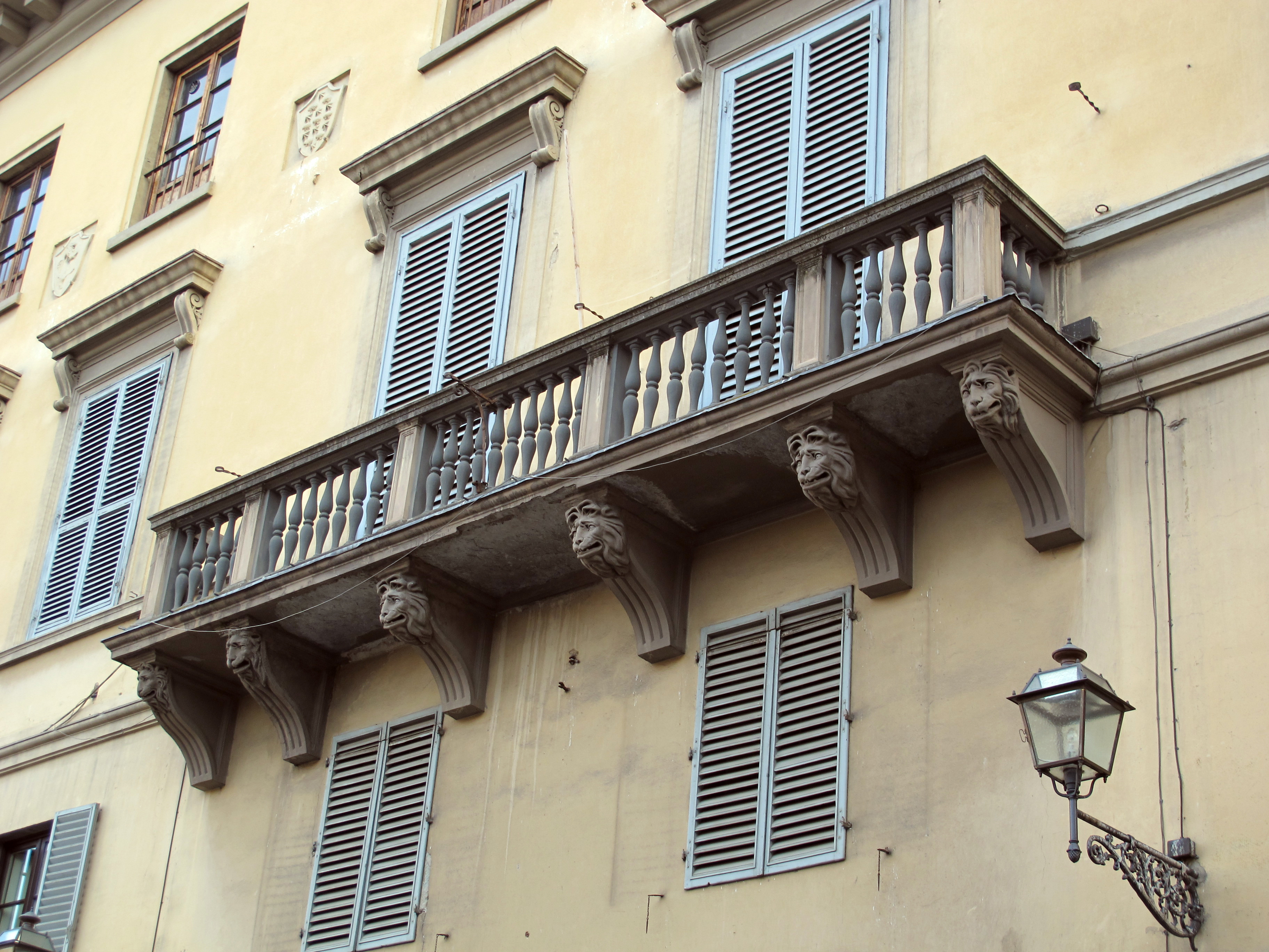 Palazzo Bartolini Baldelli su piazza santa croce 03 balcone